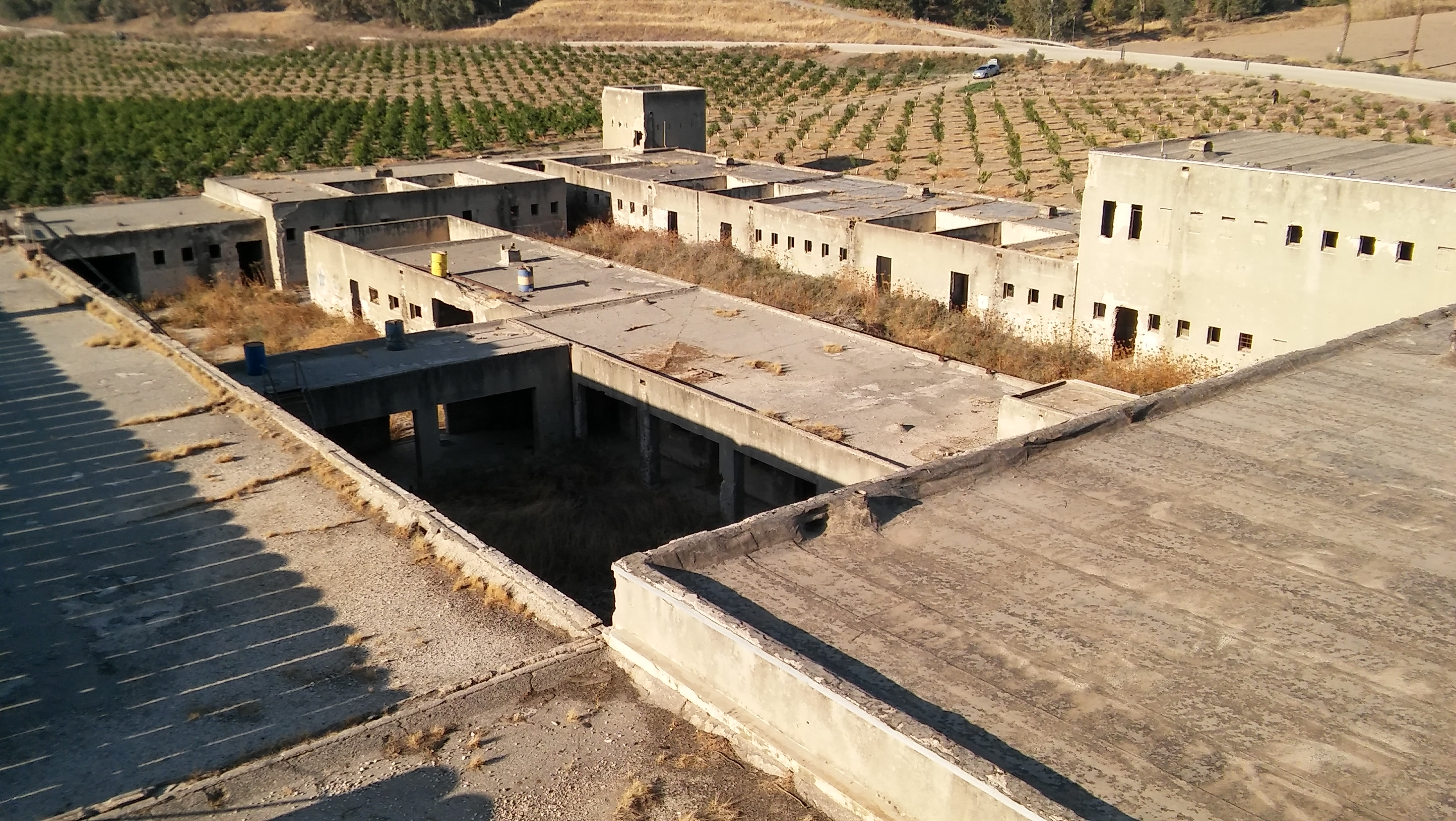 משטרת גשר